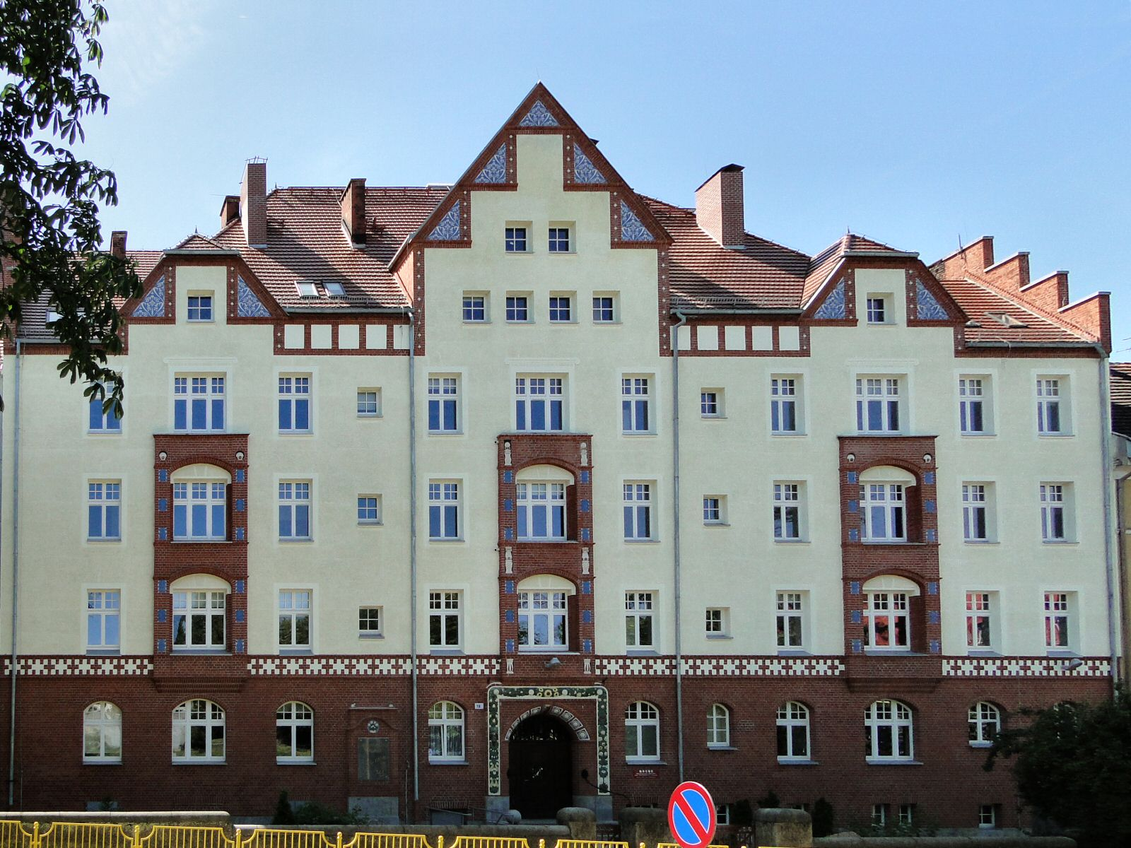 Siedziba Wydziału Nauk o Ziemi Uniwersytetu Szczecińskiego przy ulicy Mickiewicza 18 w Szczecinie.